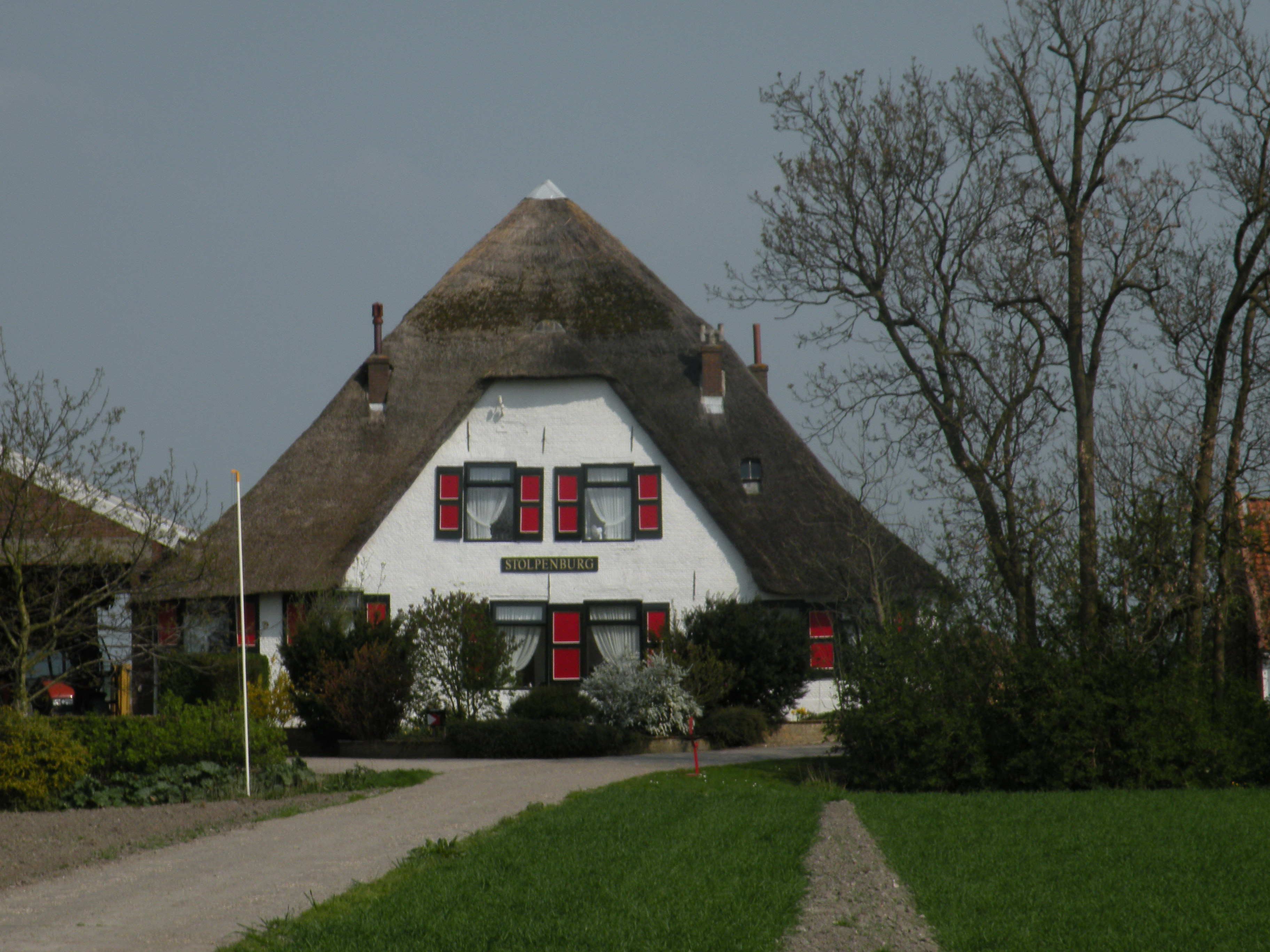 Het is een stolpboerderij in Moerkapelle